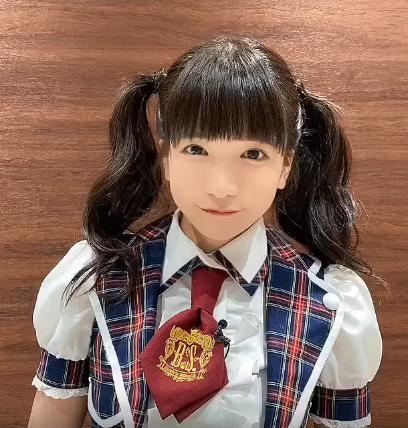 もえのあずきです。